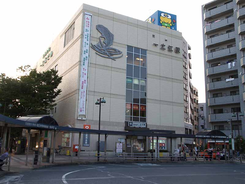 都営新宿線一之江駅の東側の出入口・今井口にある交通会館一之江ビル。環七通りは画面奥。 2007年9月3日Comyu撮影 Category:鉄道駅画像 Category:東京都交通局の画像 Category:江戸川区の画像